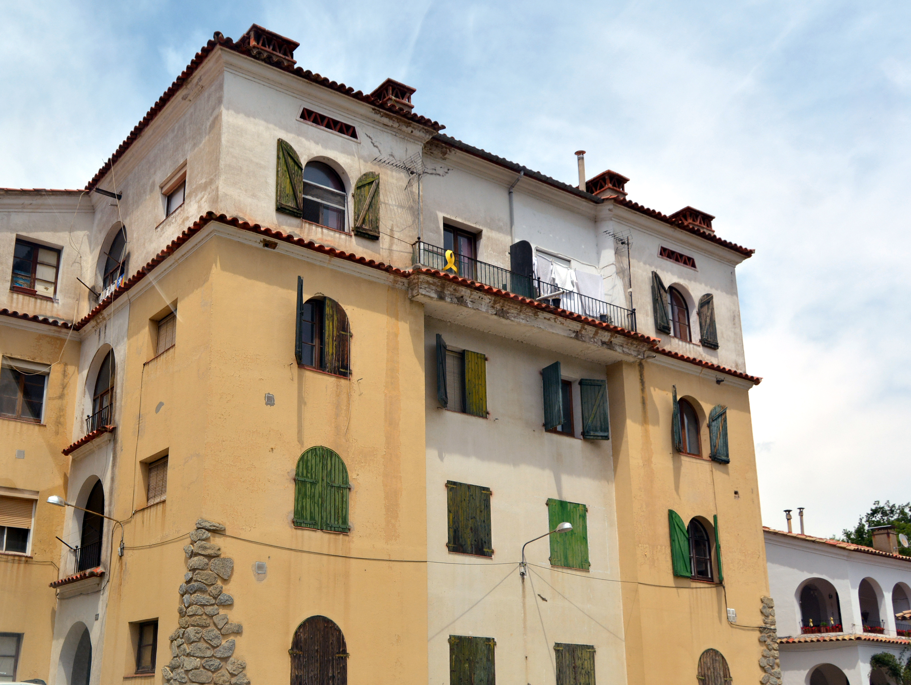 Viviendas de la colonia Llaudet, colonia textil del municipio de Sant Joan de les Abadesses (Ripollès), al pie del rio Ter, incluida en el "Inventari del Patrimoni Arquitectònic de Catalunya". El conjunto estaba formado por tres grupos de edificios alineados con planta baja y tres alturas cubiertas con tejados a dos aguas. Algunos edificios del grupo se han derribado.